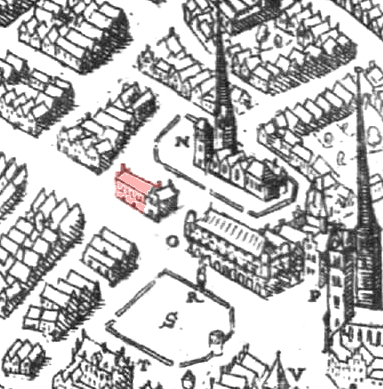 Dilich Urbis Bremae …, TABVLA VIII Ausschnitt mit Markt und Unser Lieben Frauen Kirchhof, rot nachgefärbt das Haus "Die Schuhbuden"